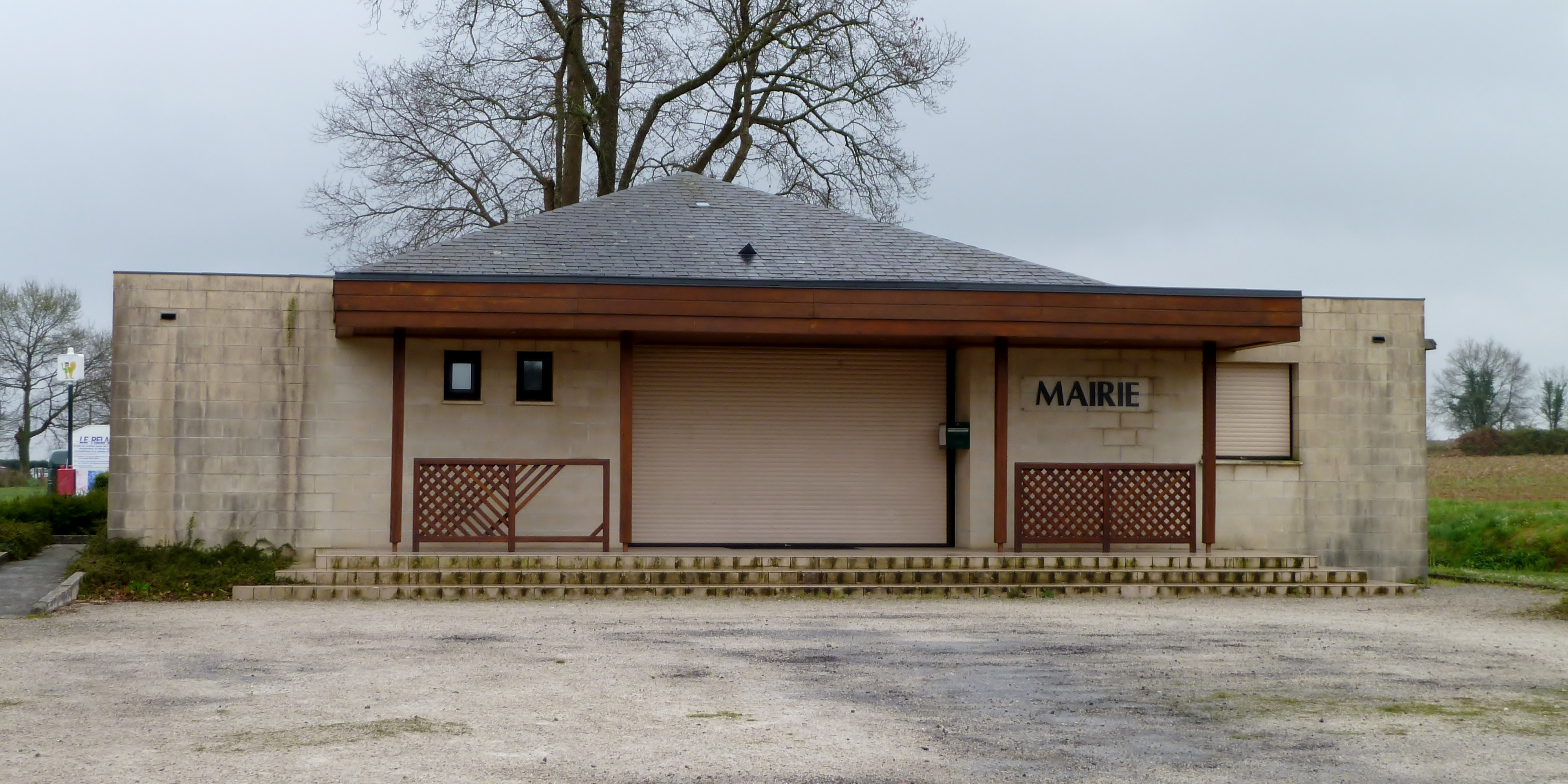 Ouillon, France